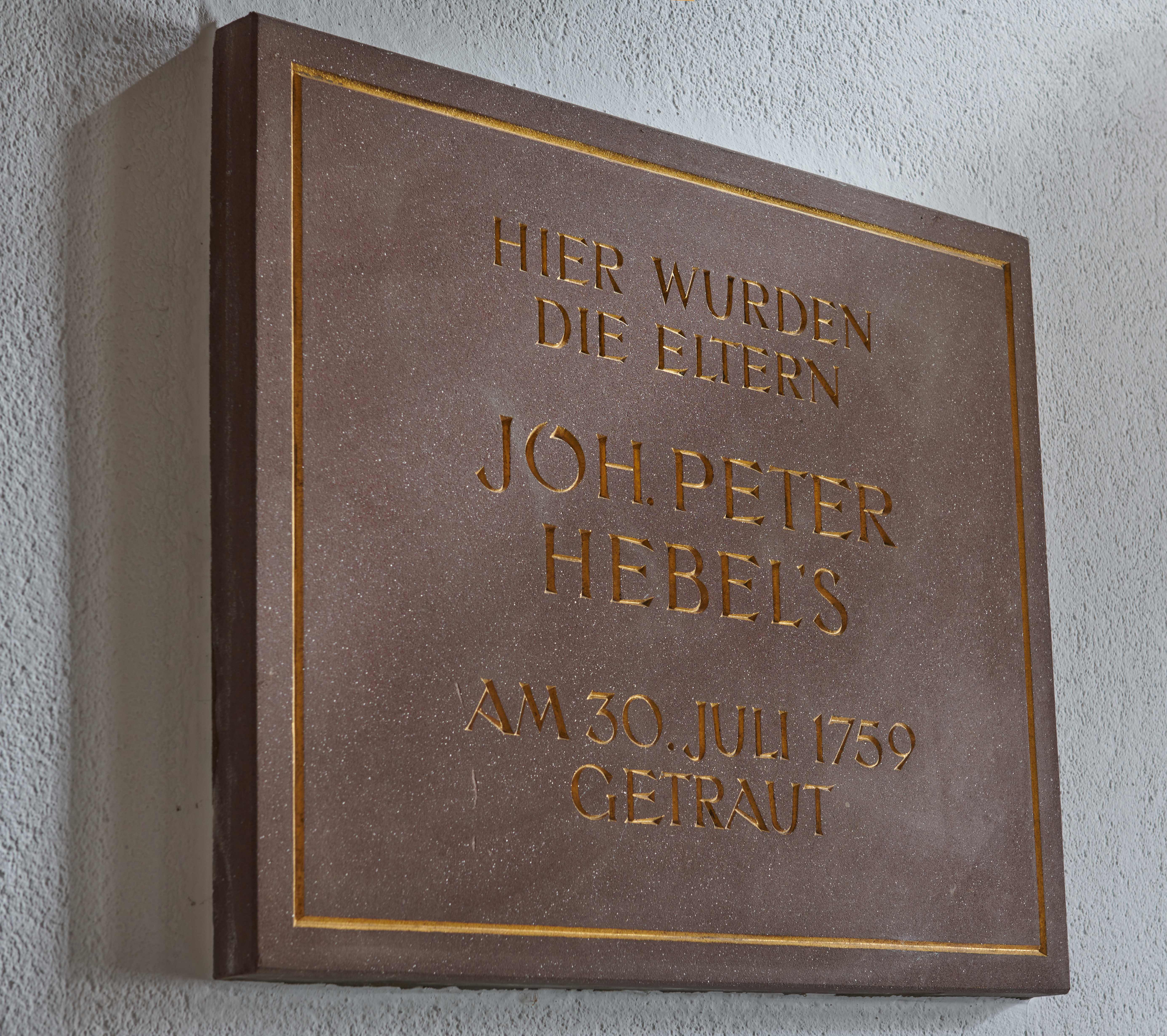 Hauinger Kirche: Tafel zur Trauung der Eltern von J.P. Hebel